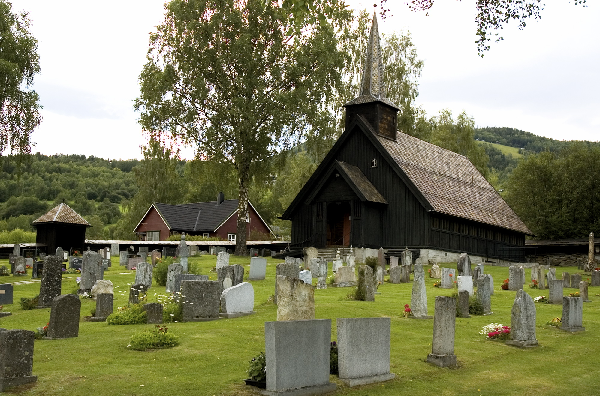 Sødorp kapell, Vinstra.